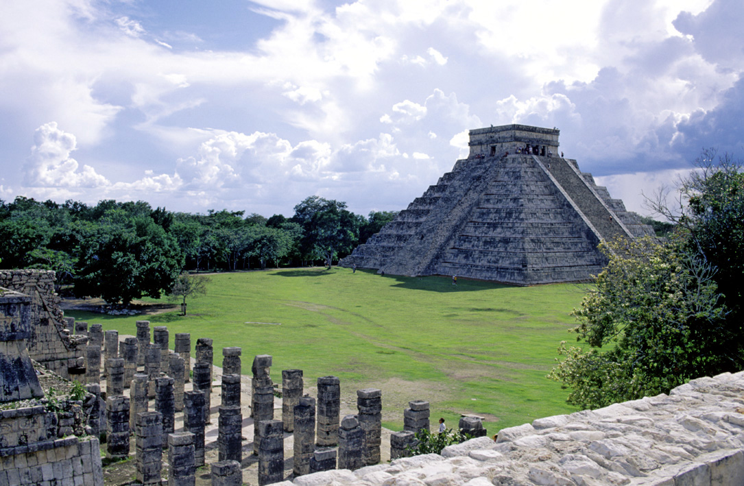 Vista panorámica del Castillo de Chichén con el Templo de las Mil Columnas en primer plano.